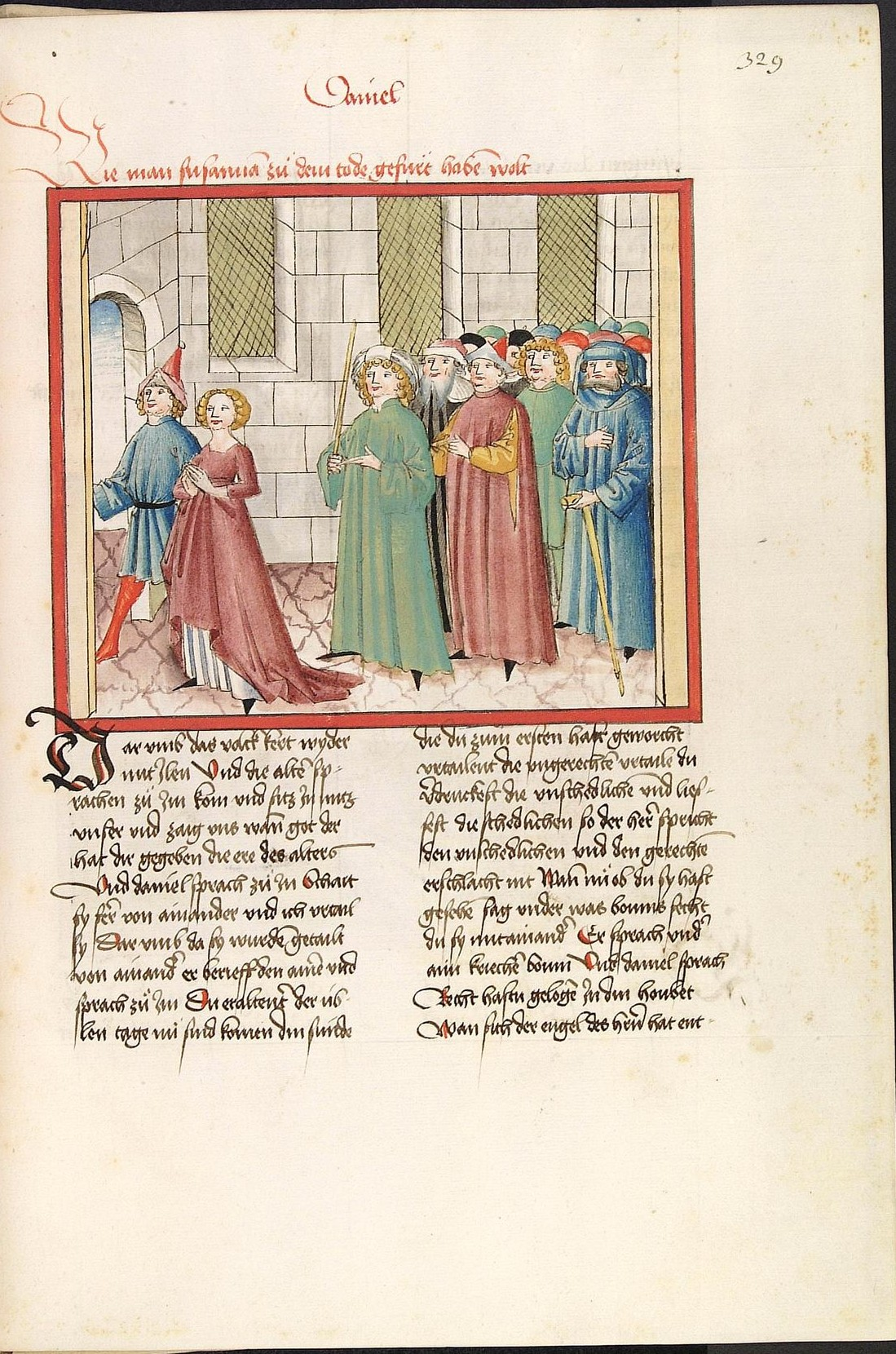 Codex Palatinus germanicus 18, Blatt 329r - Bibel, Altes Testament, Buch Daniel: Ein Gerichtsdiener hat die betende Susanna am Arm gepackt und führt sie zur Tür hinaus. Hinter ihr stehen die Richter, von denen der Vorderste einen Richterstab in Händen hält. (Cpg 18 = Bibel AT, deutsch: Psalter, Parabole, Ecclesiastes, Cantica canticorum, Sapienta, Ecclesiasticus, Propheten)